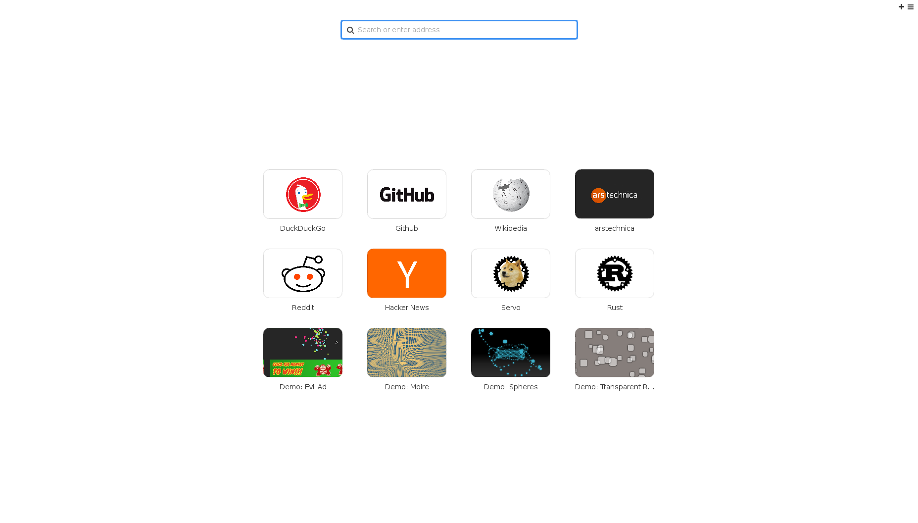 Page d'accueil de servo version 0.01